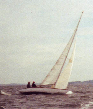 5.5-er (5.5 Rm oder 5.5m IC), Greifswalder Bodden